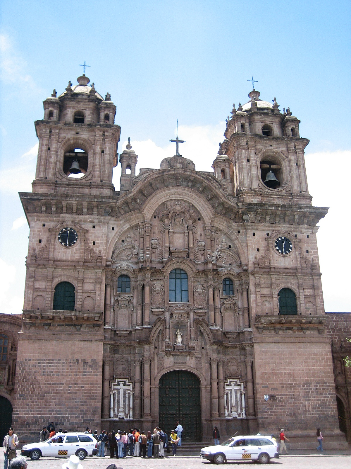 Iglesia de la compañía de Jesús.